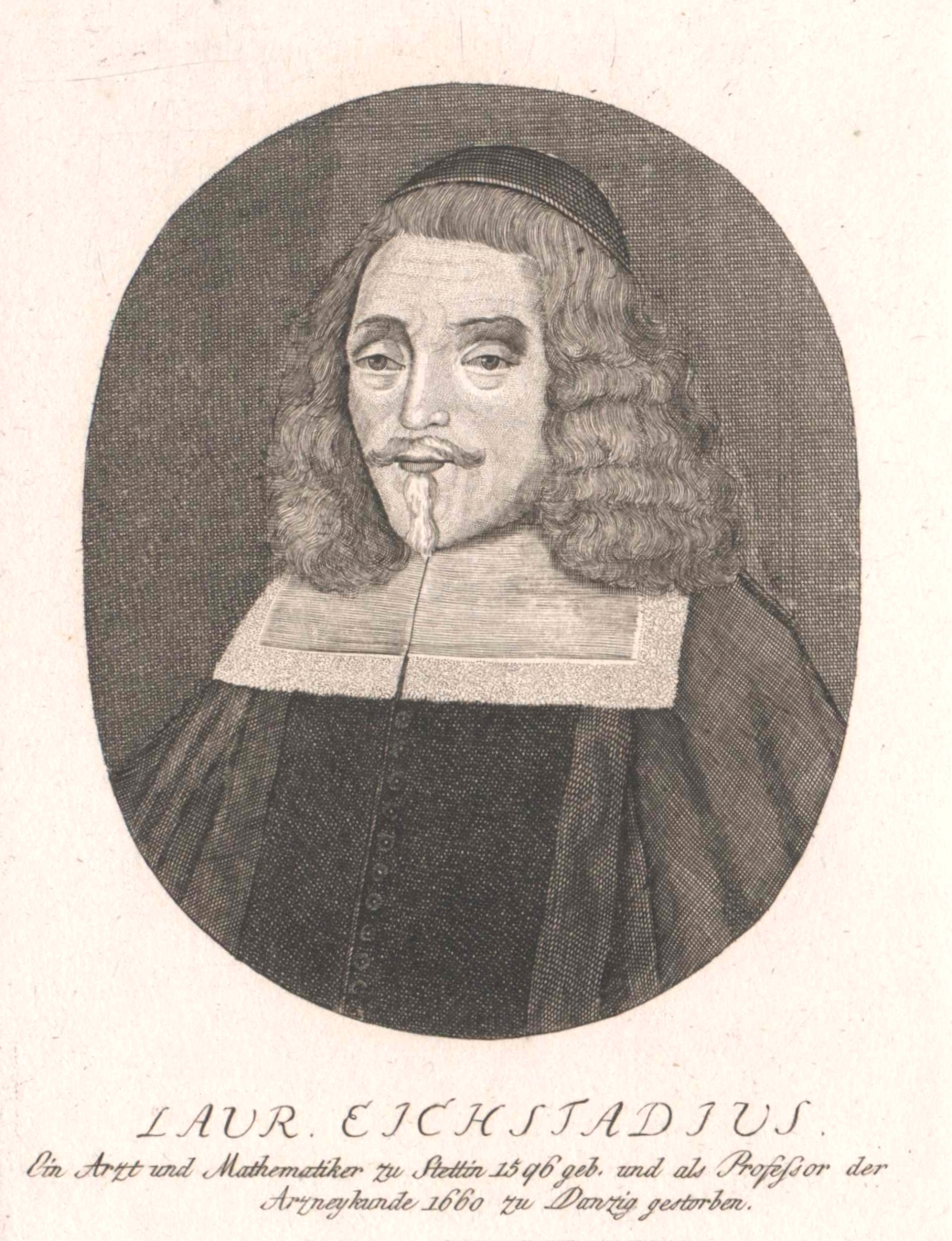 Eichstaedt, Lorenz (Arzt, Mathematiker; Präses an der Universität Danzig, Professor am Pädagogischen Seminar in Danzig, 1596-1660)